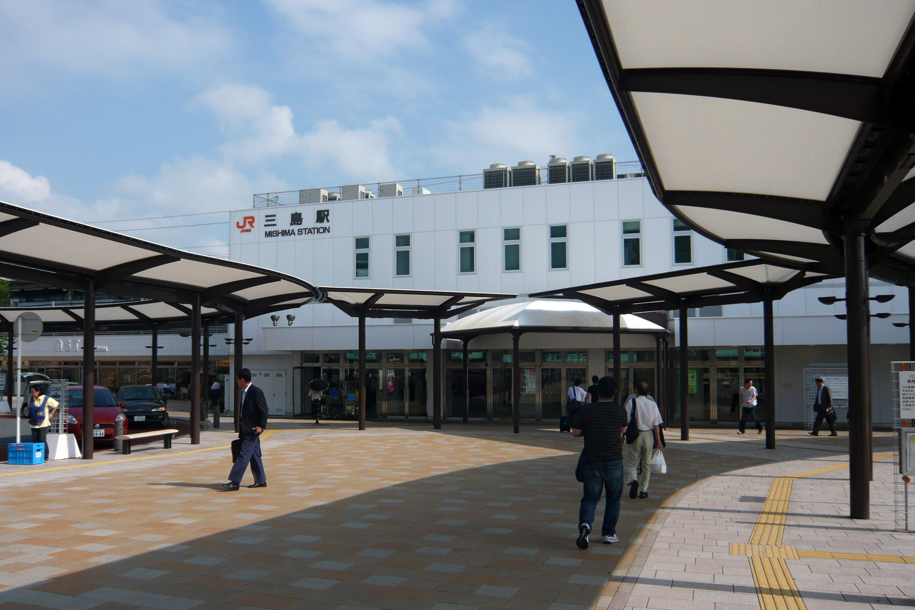 Mishima-eki (三島駅), Mishima, Shizuoka prefecture, Japan